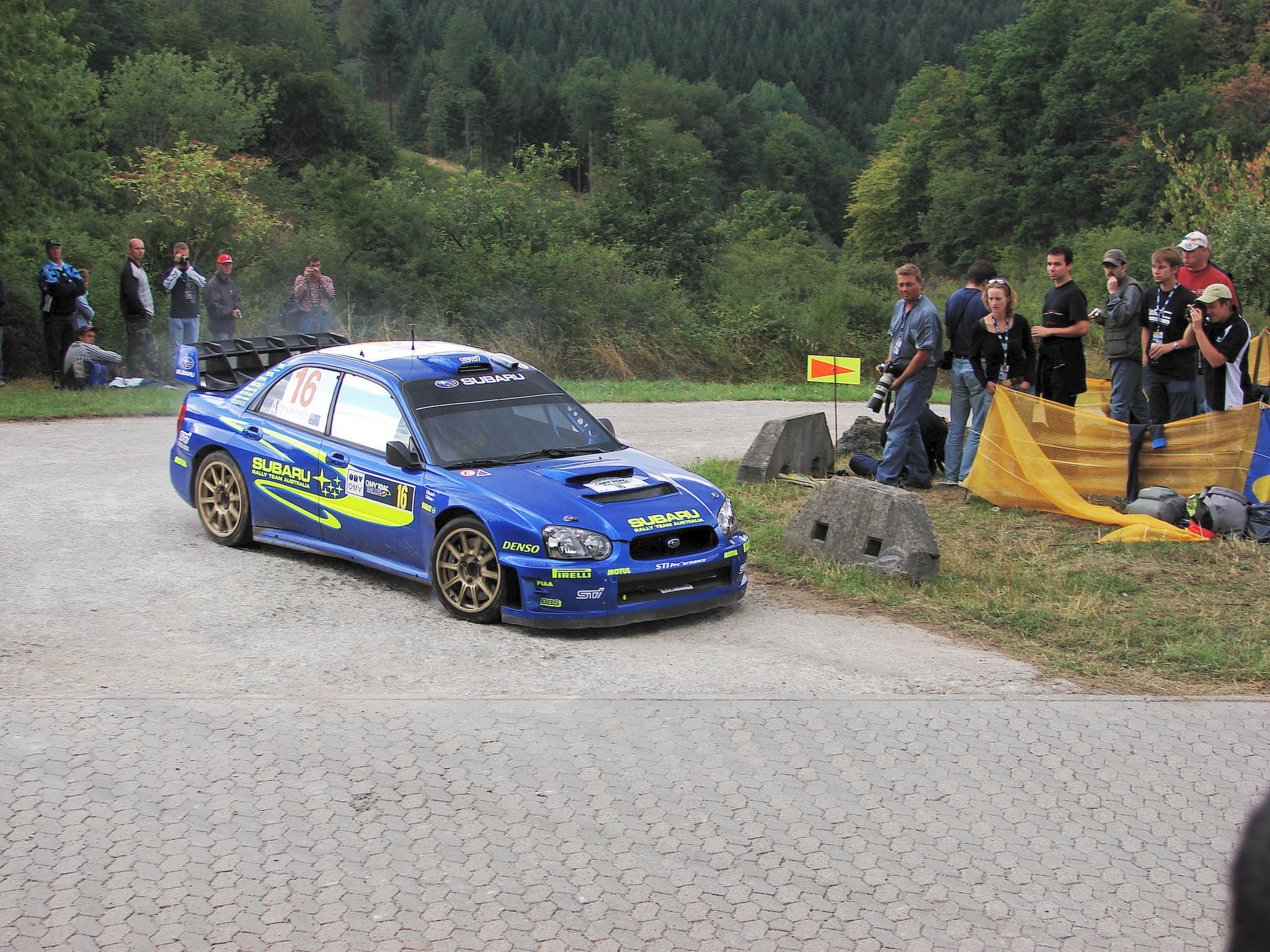 Chris Atkinson, Allemagne 2006